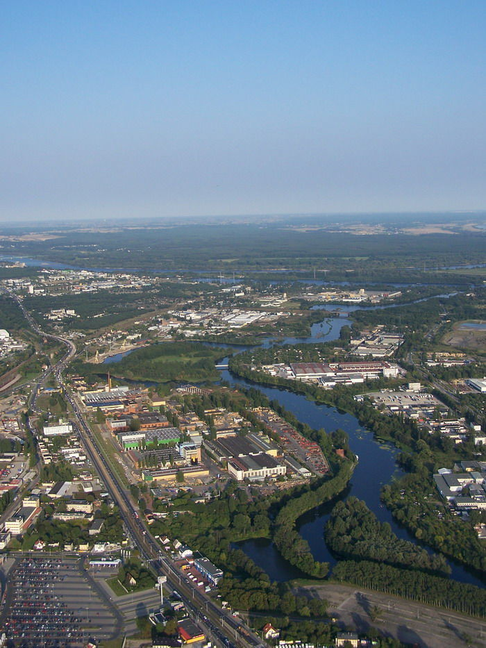 Wyspa Wisielca w Bydgoszczy